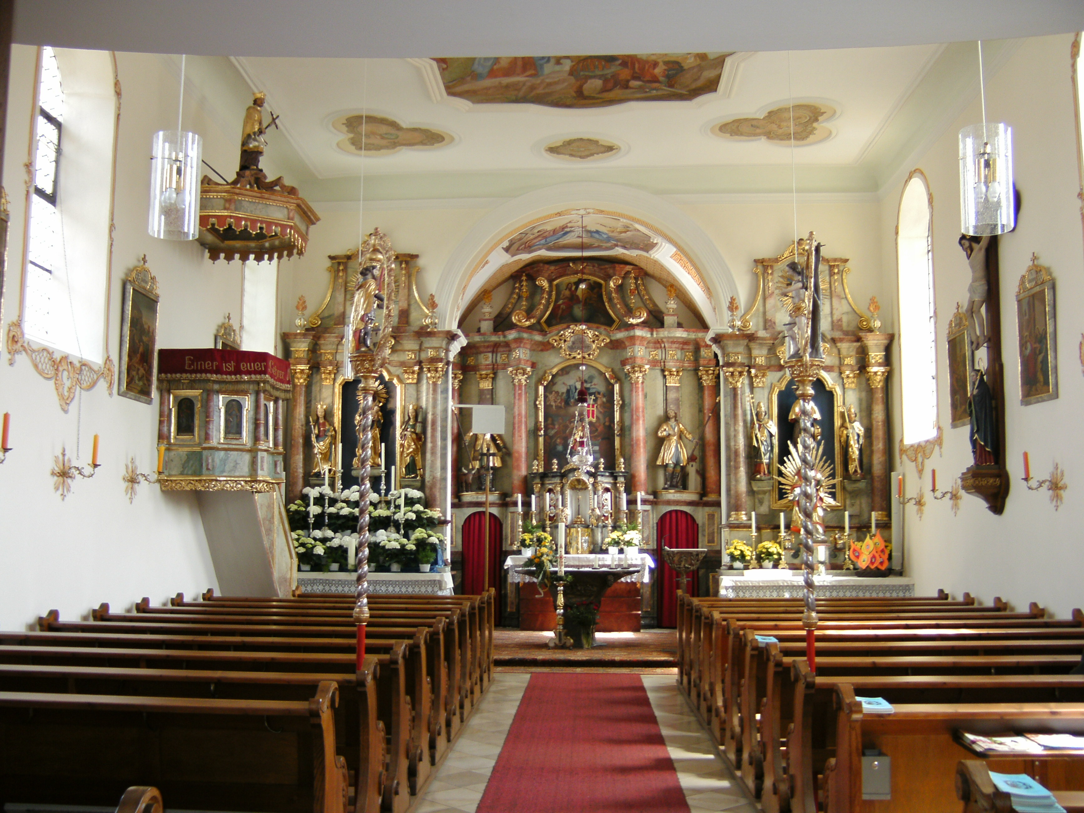 Inneres der Kirche von Zell, Ortsteil der Gemeinde Dietfurt an der Altmühl im Landkreis Neumarkt in der Oberpfalz in Bayern